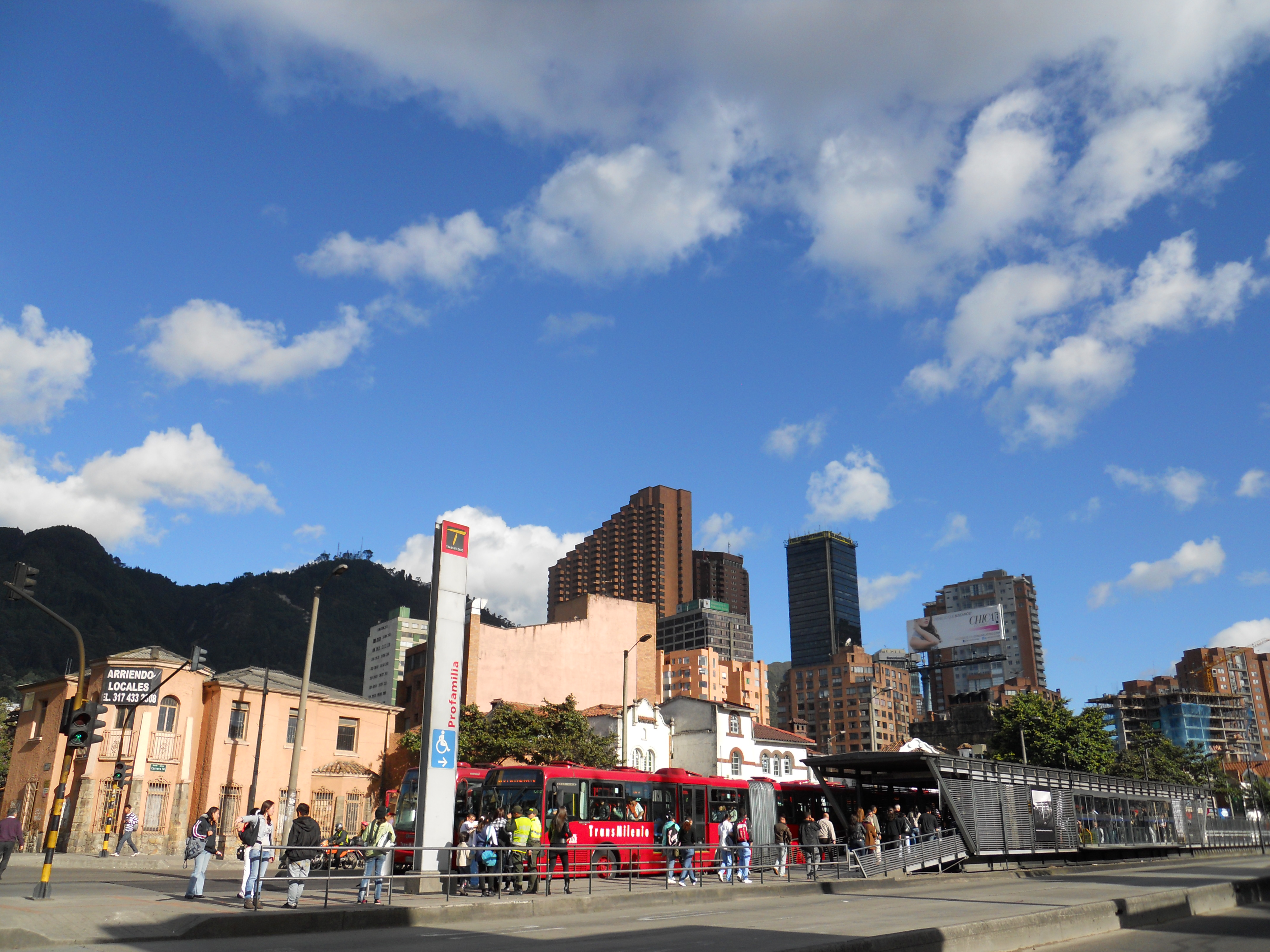 Estación de Transmilenio. Profamilia.